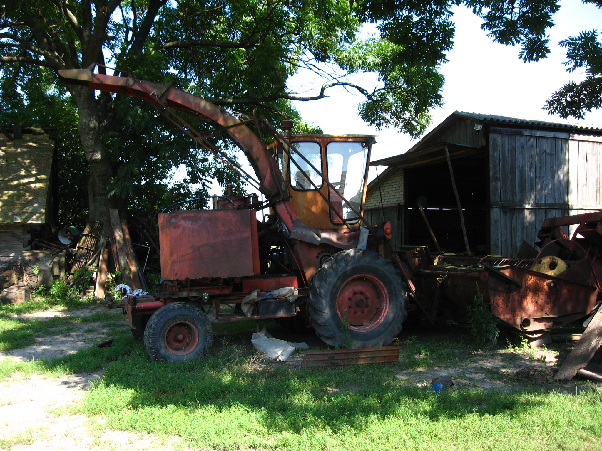 Sieczkarnia Orkan Z310 widoczna z boku